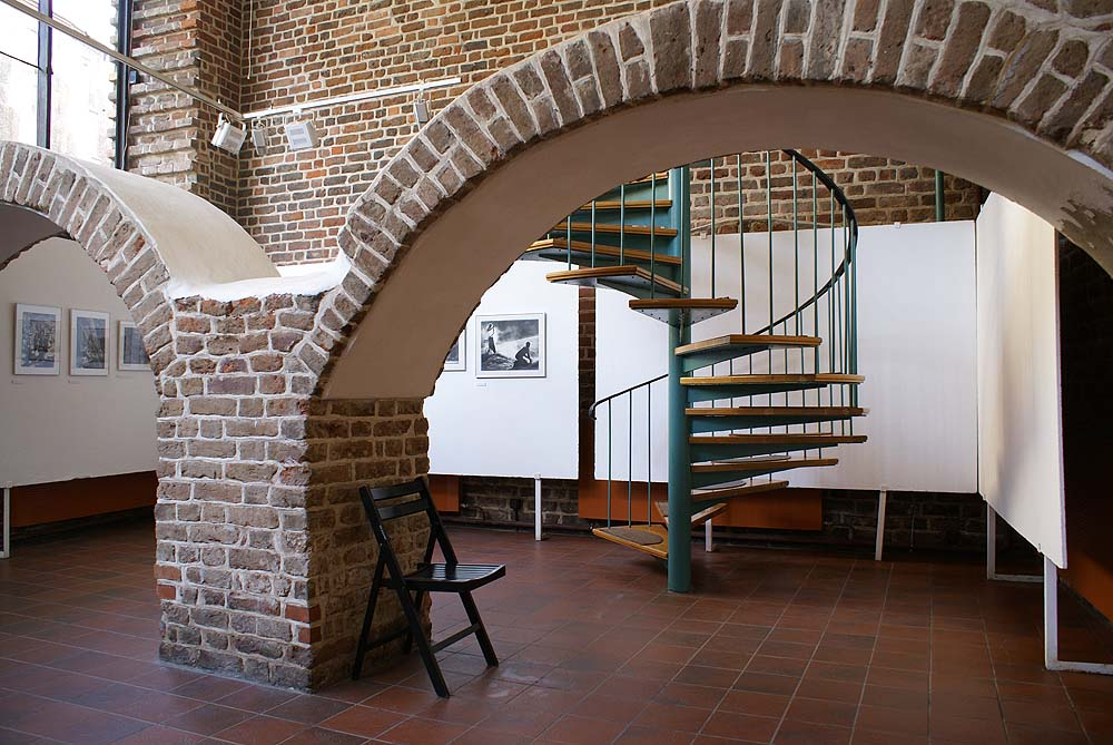 Dom Panien Trzebnickich, ob. Galeria Fotografii „Dom romański” pl. Nankiera 8, Miasto Wrocław - Stare Miasto